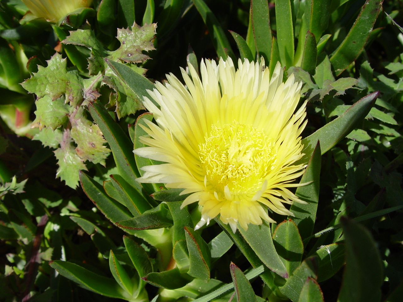 Name Carpobrotus edulis Familiy Aizoaceae